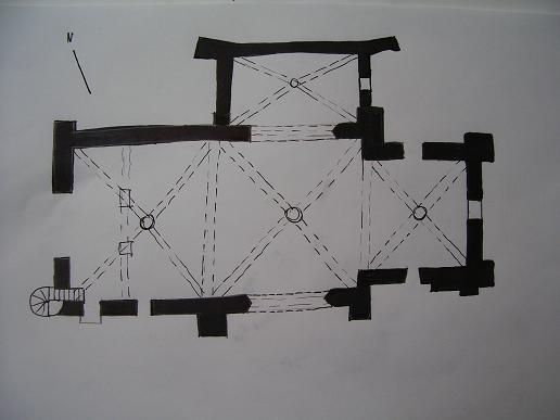 Grundriss der PK Saint-Julien Saint-Félix-de-Lodez im 14.JH